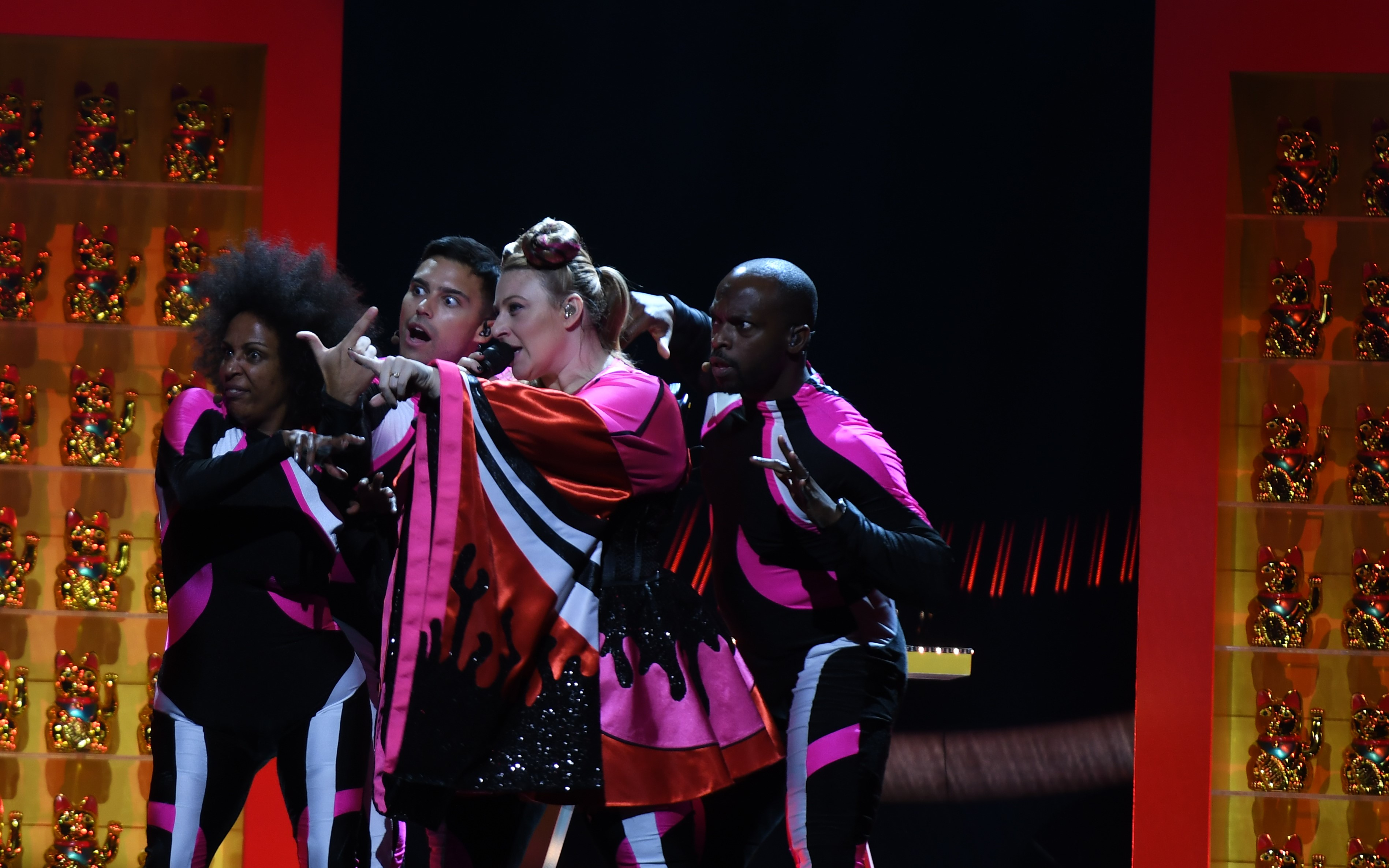 Melodifestivalen 2019, deltävling 1, Scandinavium, Göteborg, programledarna,, mellanakten Kodjo Akolor, Marika Carlsson, Sarah Dawn Finer, Eric Saade